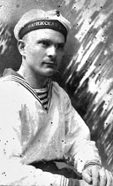 Платон Головач - почётный матрос линкора 'Парижская коммуна'. В 1927–м Платон, секретарь ЦК ЛКСМ Беларуси, возглавлял группу белорусских писателей, отправленную в Ленинград. В числе прочего делегаты выступали перед матросами линкора «Парижская коммуна». Видимо, там Головача и приняли в почетные матросы. В архиве снимок обозначен 1928 годом, возможно, это ошибка или Платон сфотографировался в подаренной форме позже. 1 июня в газете «Чырвоная змена» печатался отчет о поездке «Маладнякоўская ўдзячнасць».